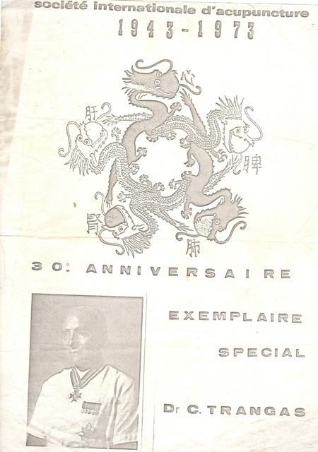 Τριακοστή επέτειος από συστάσεως της Διεθνούς Εταιρείας Βελονισμού (1943-1973). Αφιερωμένη στον έλληνα ιατρό Κωνσταντίνο Τράγκα.